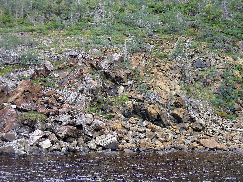 ภาพแสดงชุดหินโอฟิโอไลต์ บริเวณอุทยานแห่งชาติ Gros Morne National Park, Newfoundland.